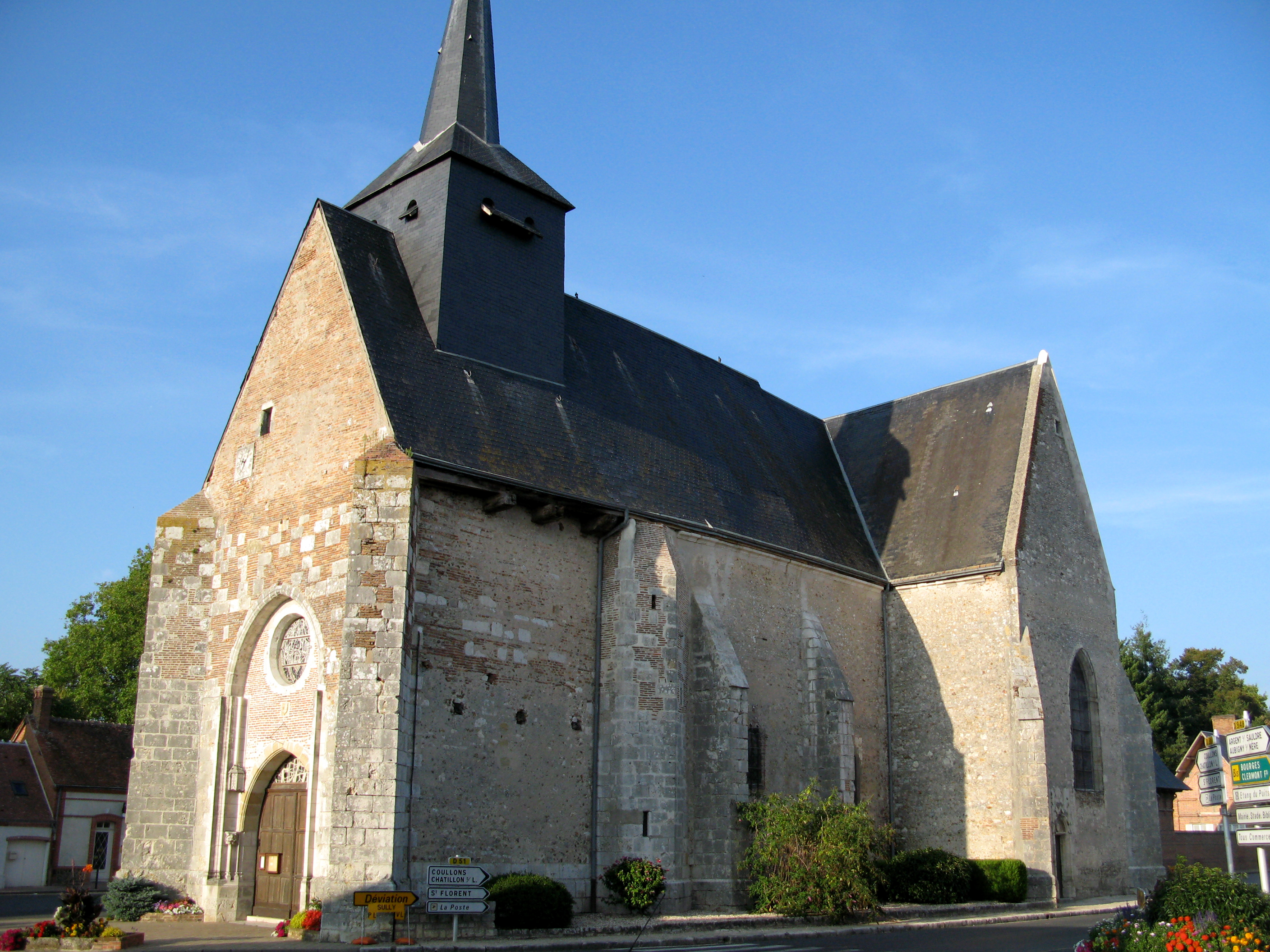 Cerdon (Loiret, France) - L'église. . .